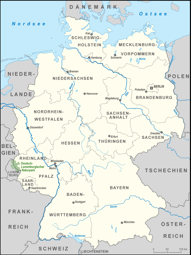 Karte des Deutsch-Luxemburgischen Naturparks in Deutschland und in Luxemburg